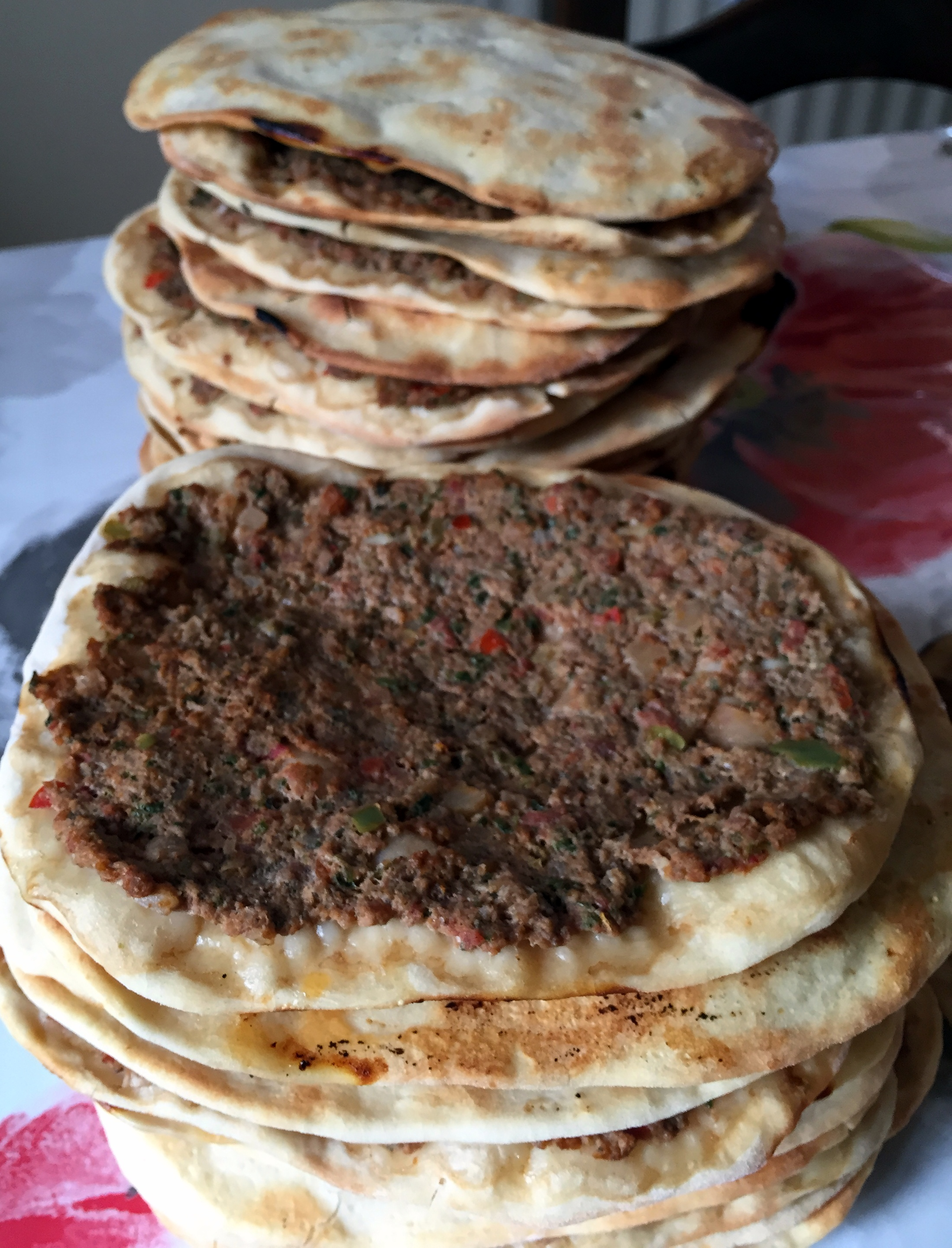 Des lahmajouns sortant du four.